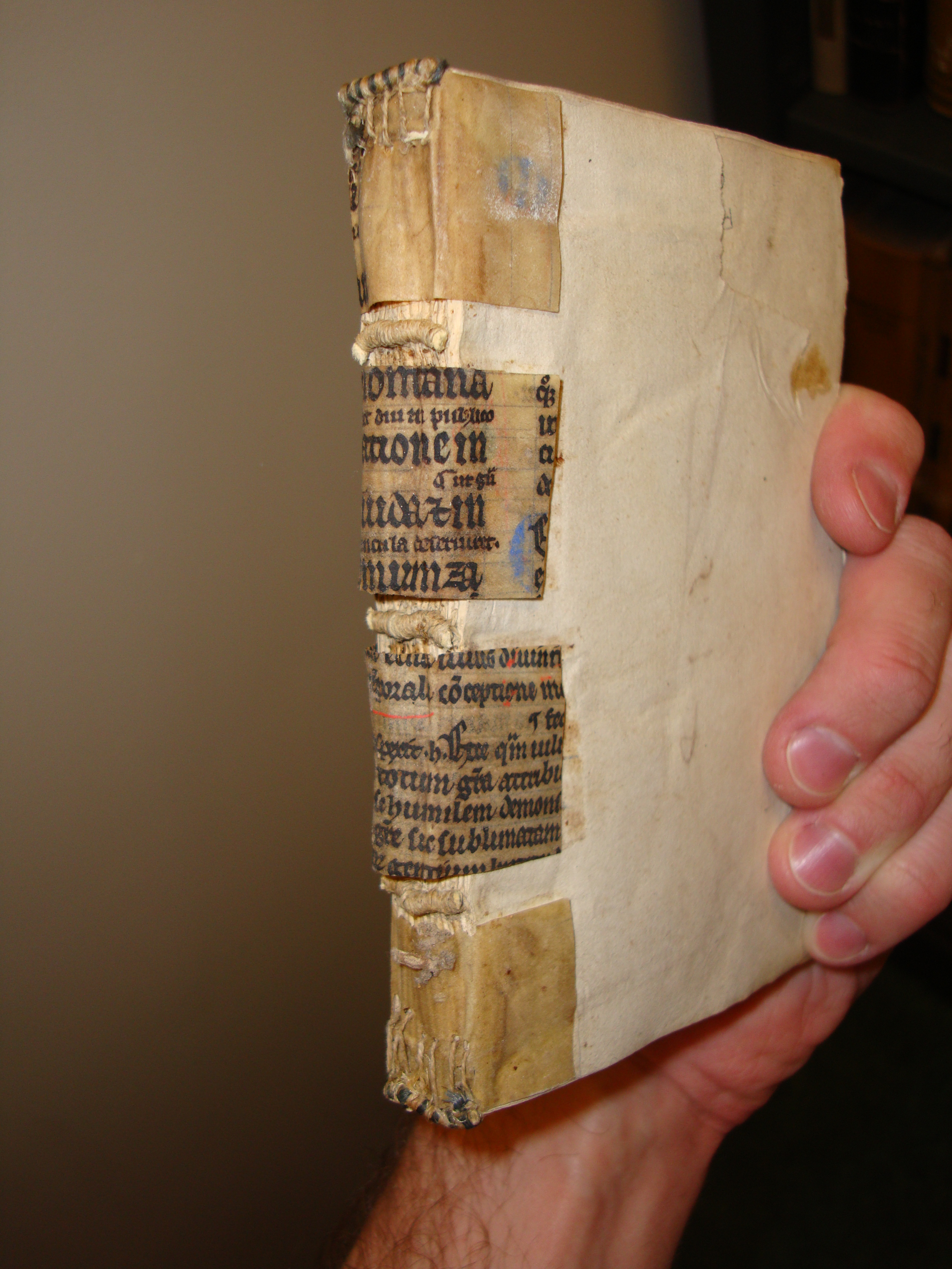 RL 46 L309s-2